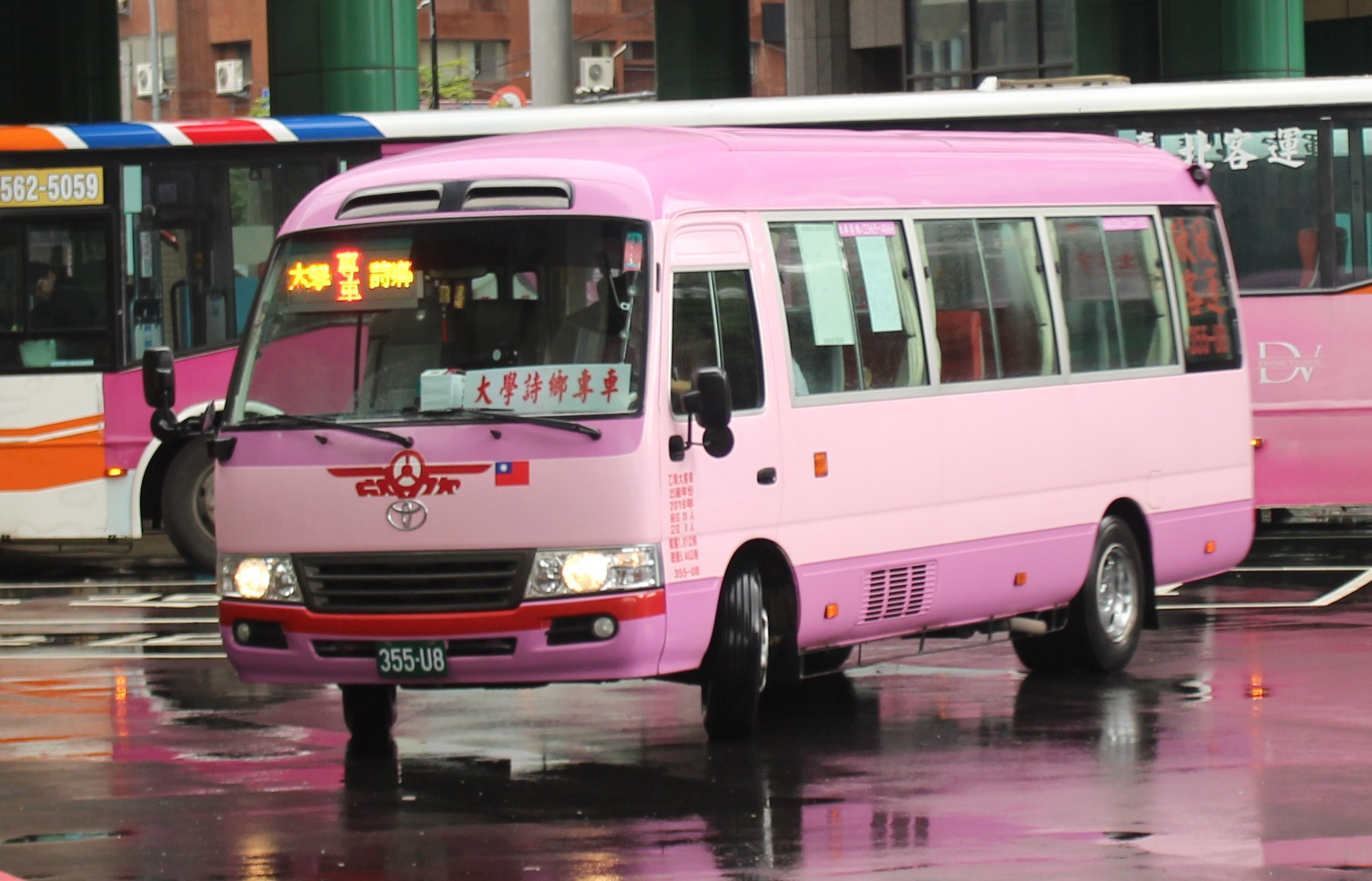 欣欣客運 355-U8 大學詩鄉專車